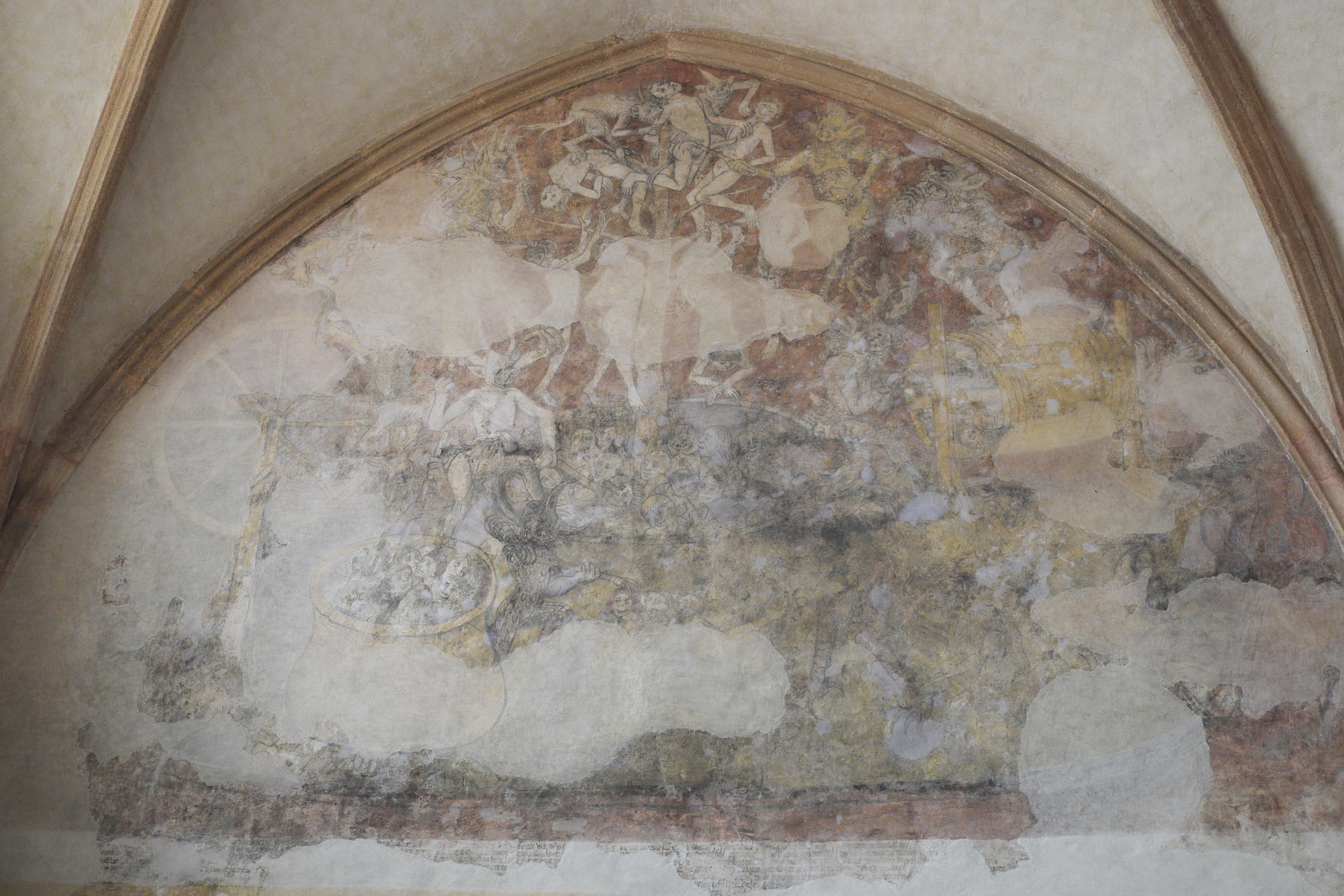 Katholische Kirche Notre-Dame in Kernascléden im Département Morbihan (Region Bretagne/Frankreich), Totentanz, um 1440